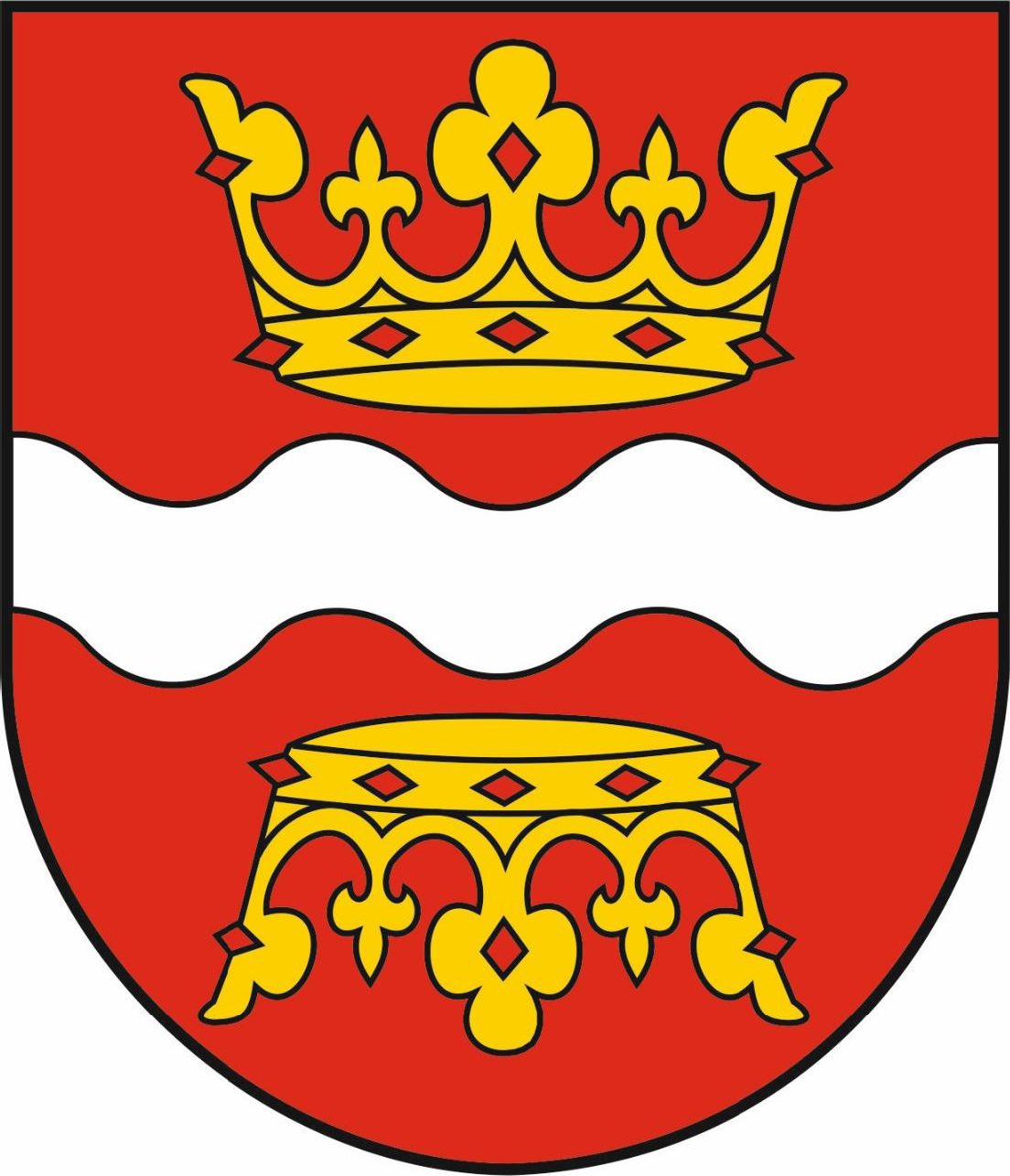 Herb gminy Golub-Dobrzyń